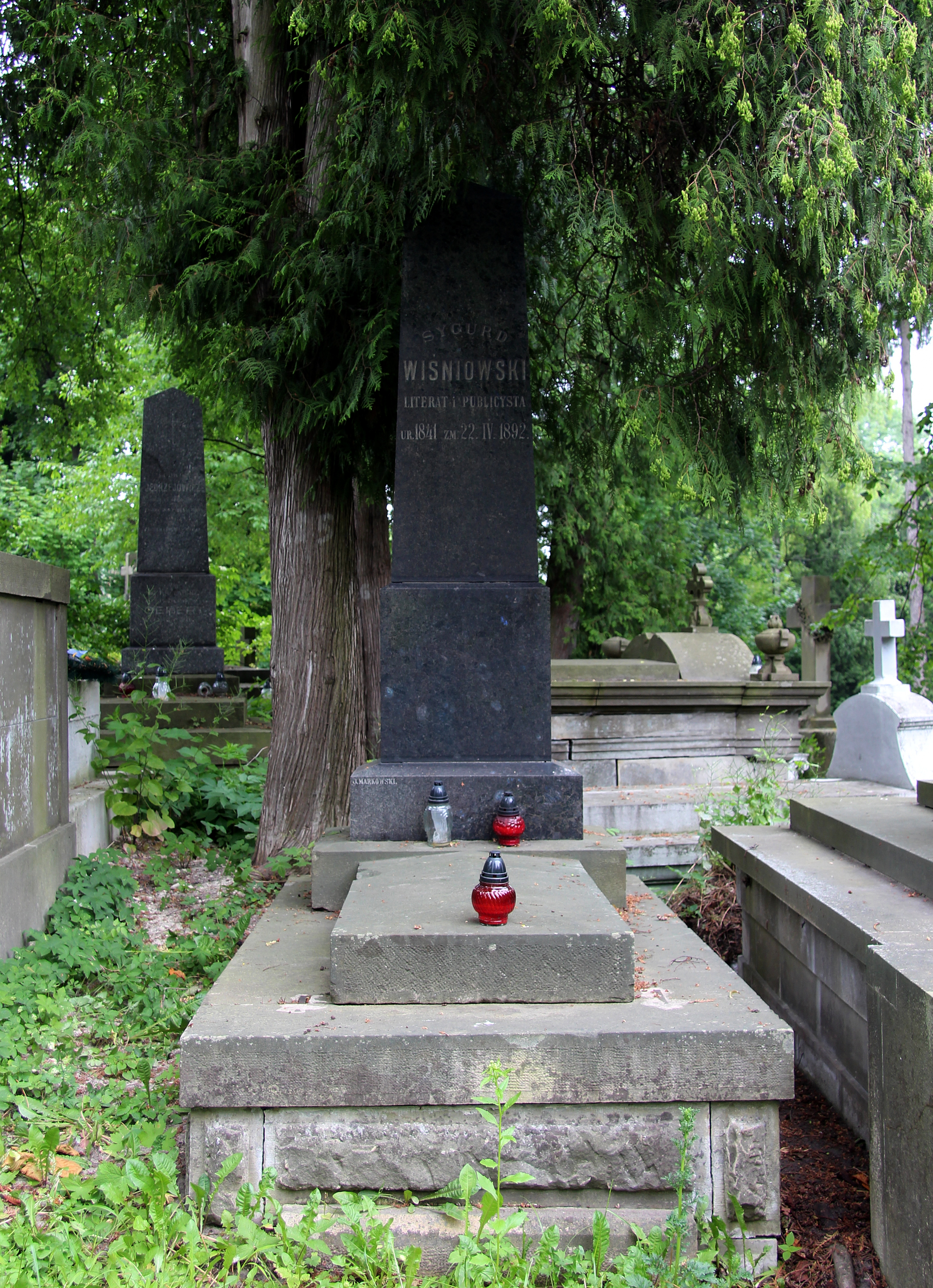 Пам'ятник на могилі С. Вісьньовського.Личаківський цвинтар , 68 поле.